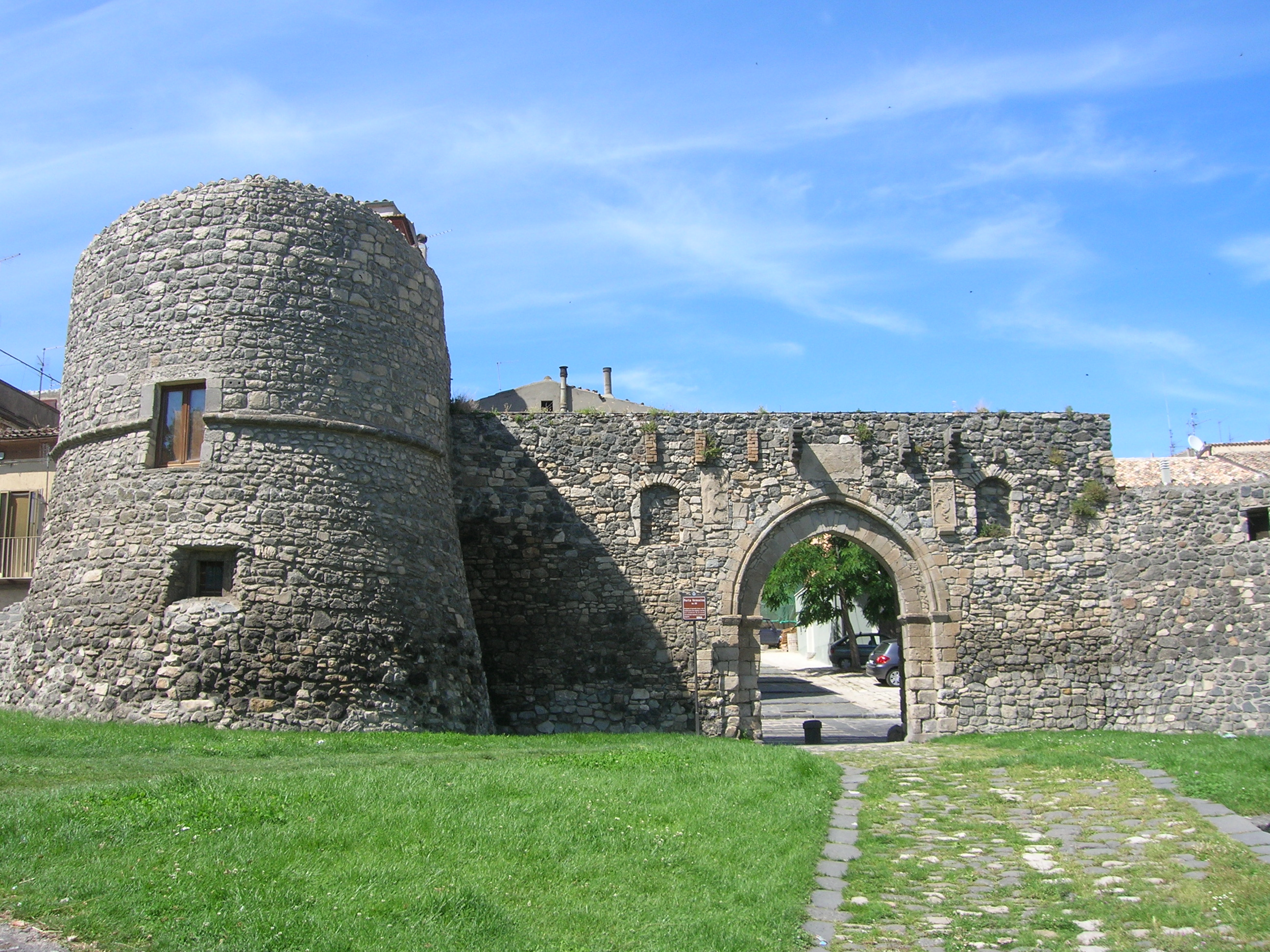 Porta Venosina, Melfi (Basilicata)